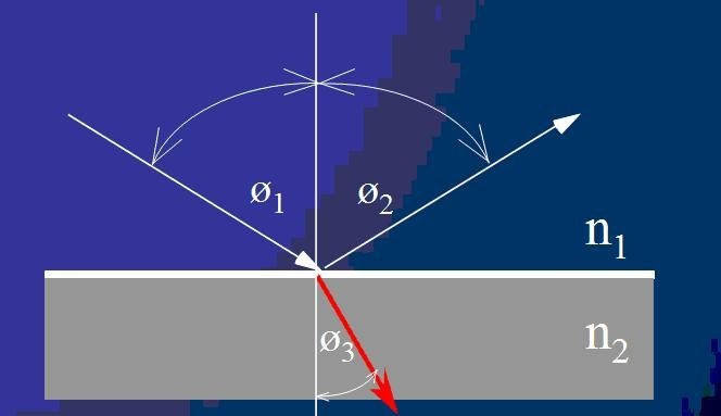 Refraksie: Hoe lig refrakteer